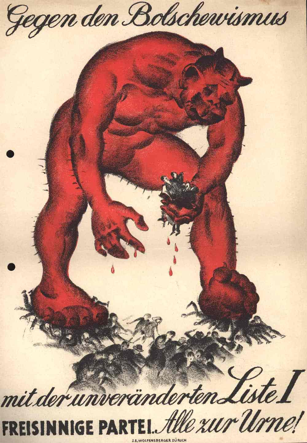 Nach­wehen des Landes­streiks: Wahl­plakat der FDP von 1919; Quelle: Sozi­al­ar­chiv Zürich, Schweiz